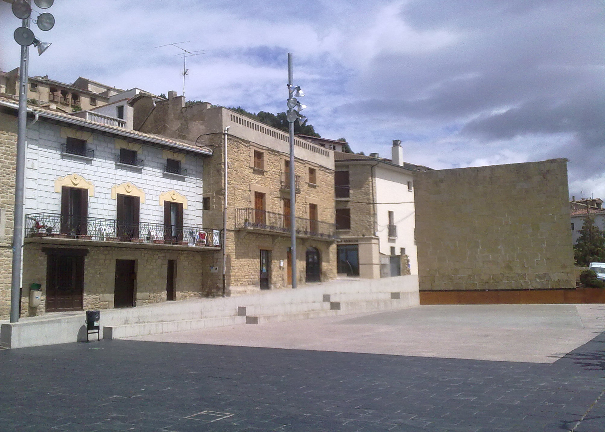 Oibarko udaletxe plazaren ikuspegia.